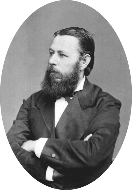 Annensky Nikolay